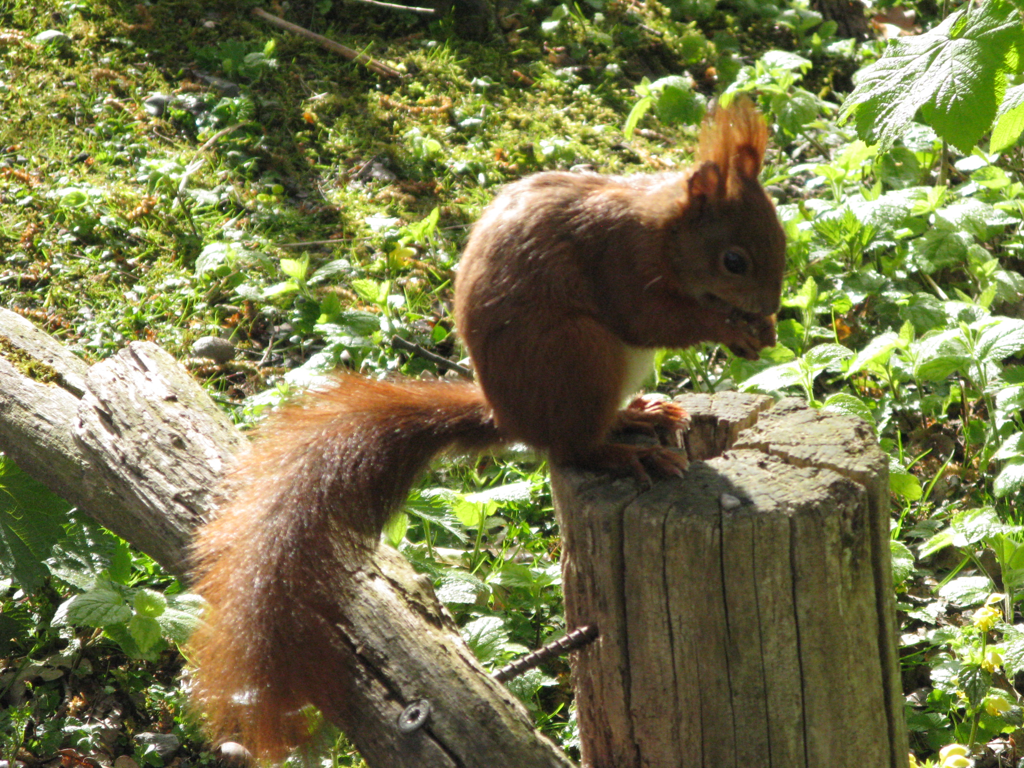 Eichhörnchen